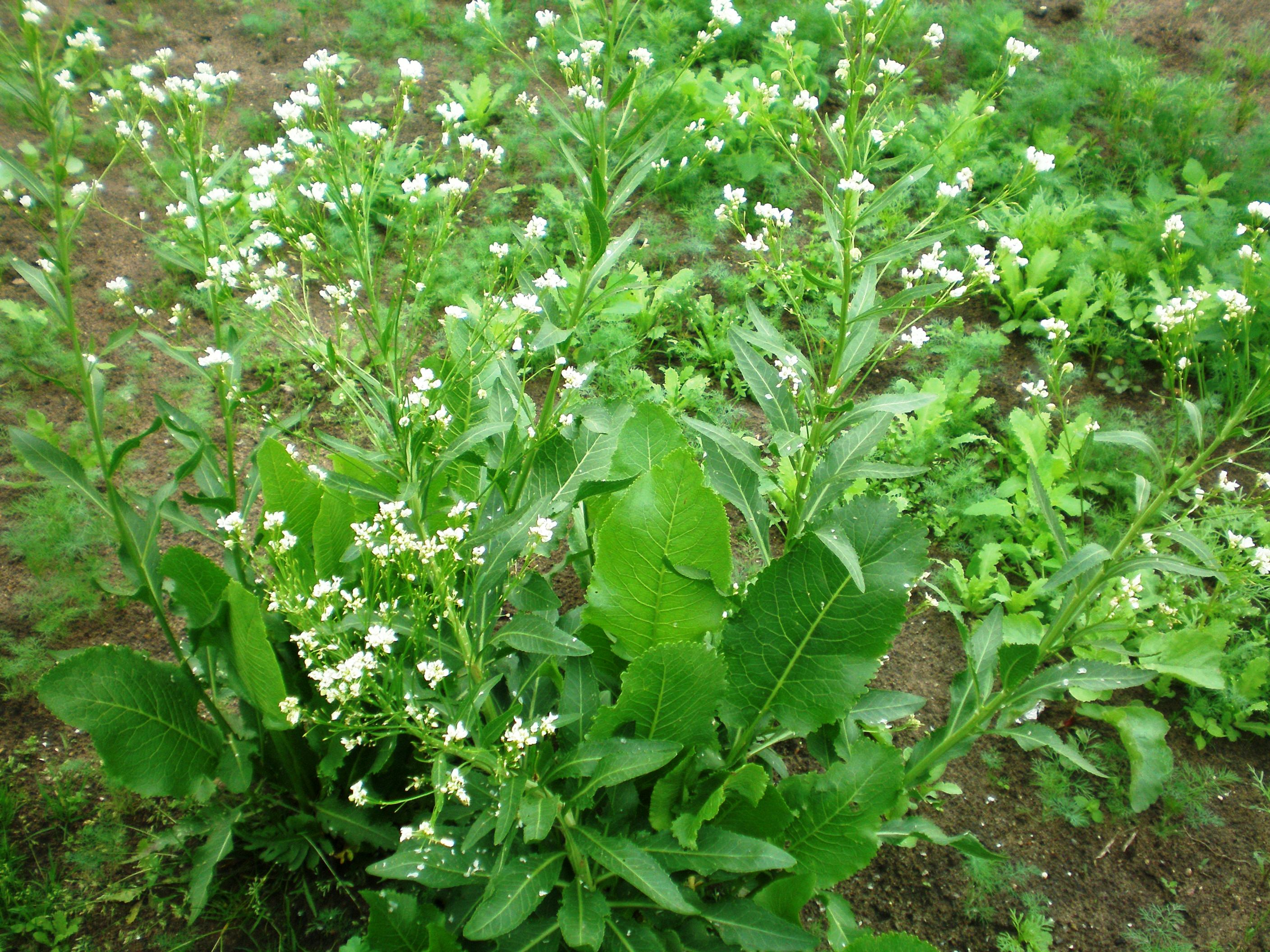 Armoracia rusticana